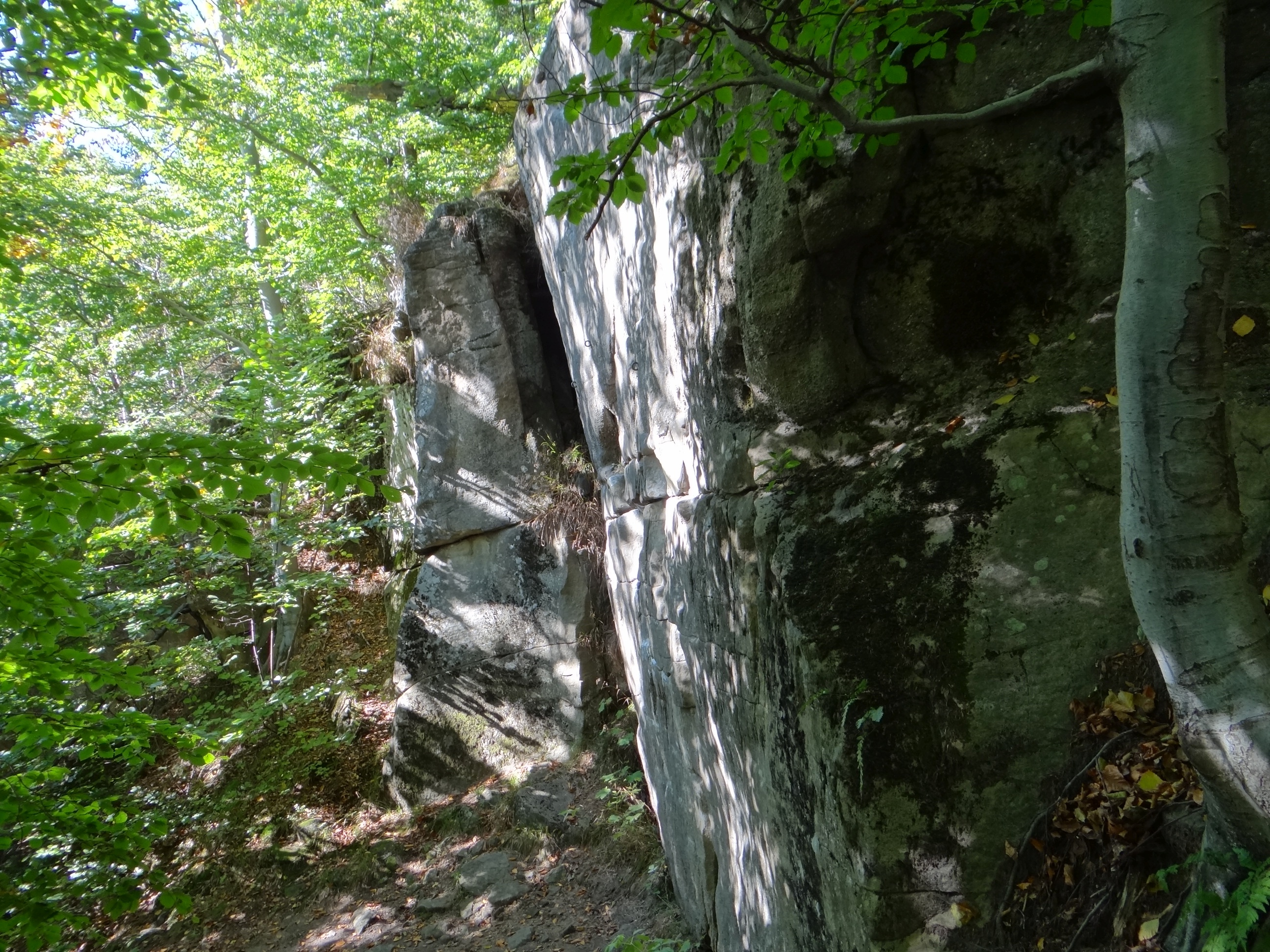 Zamczysko na Ścieszków Groniu